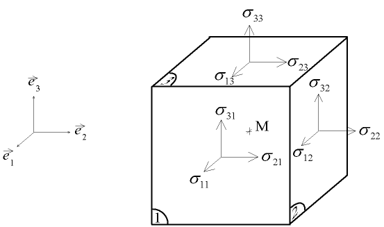 Notation généralisée du tenseur des contraintes — Generalised stress tensor notation. Auteur : Christophe Dang Ngoc Chan (Cdang).